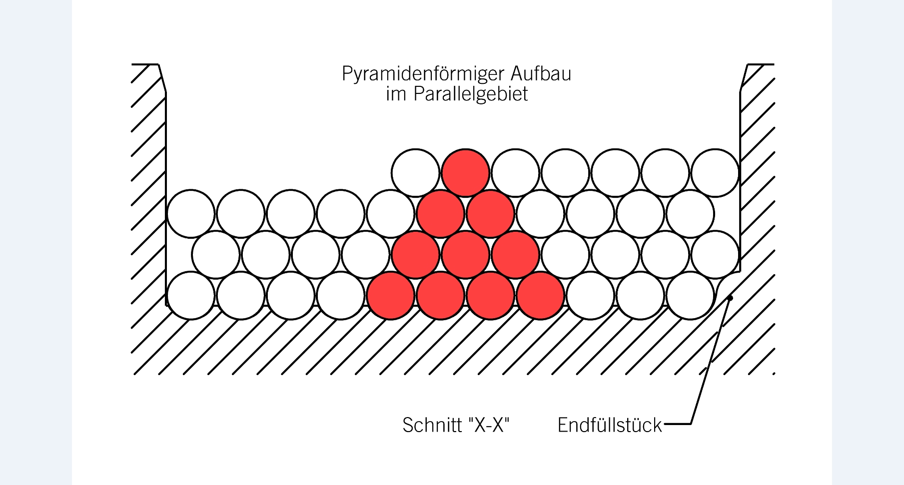 Schnitt, Pyramide